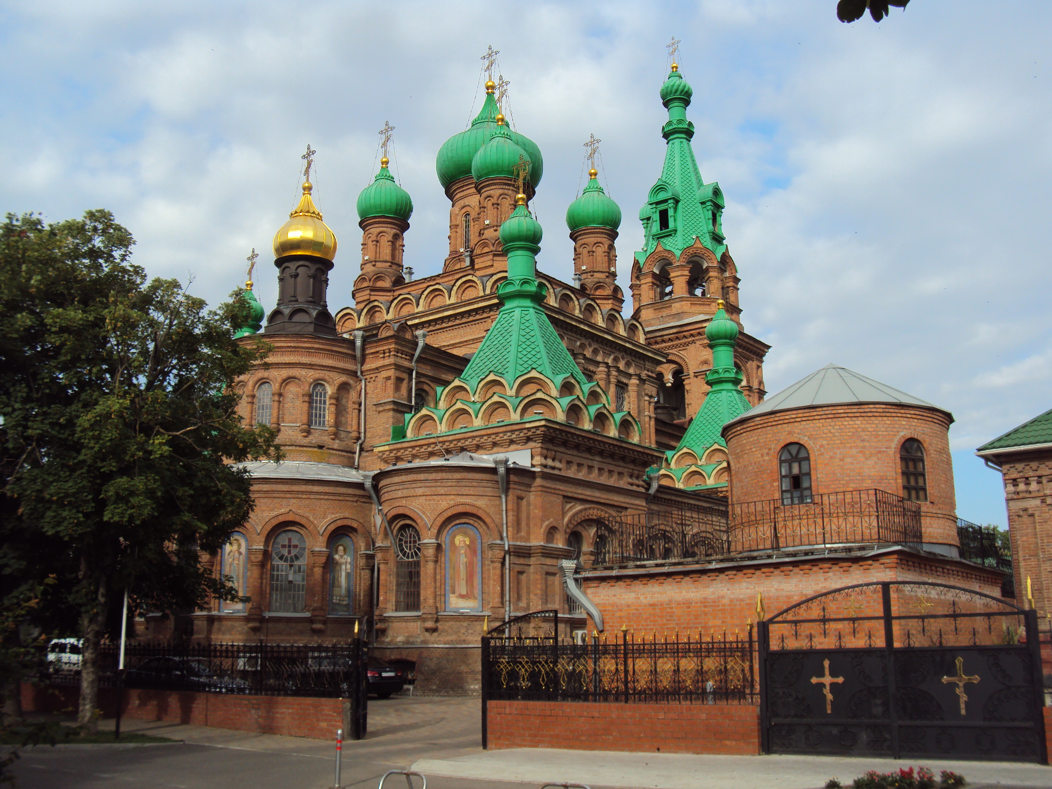 троицкая церковь (Краснодарский край, Краснодар, улица свердлова, 67)